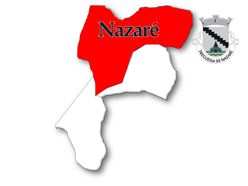 Evolução da População